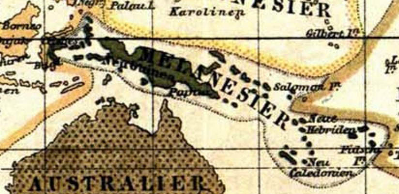 Melanesier (Ausschnitt „Ethnographische Karte“)